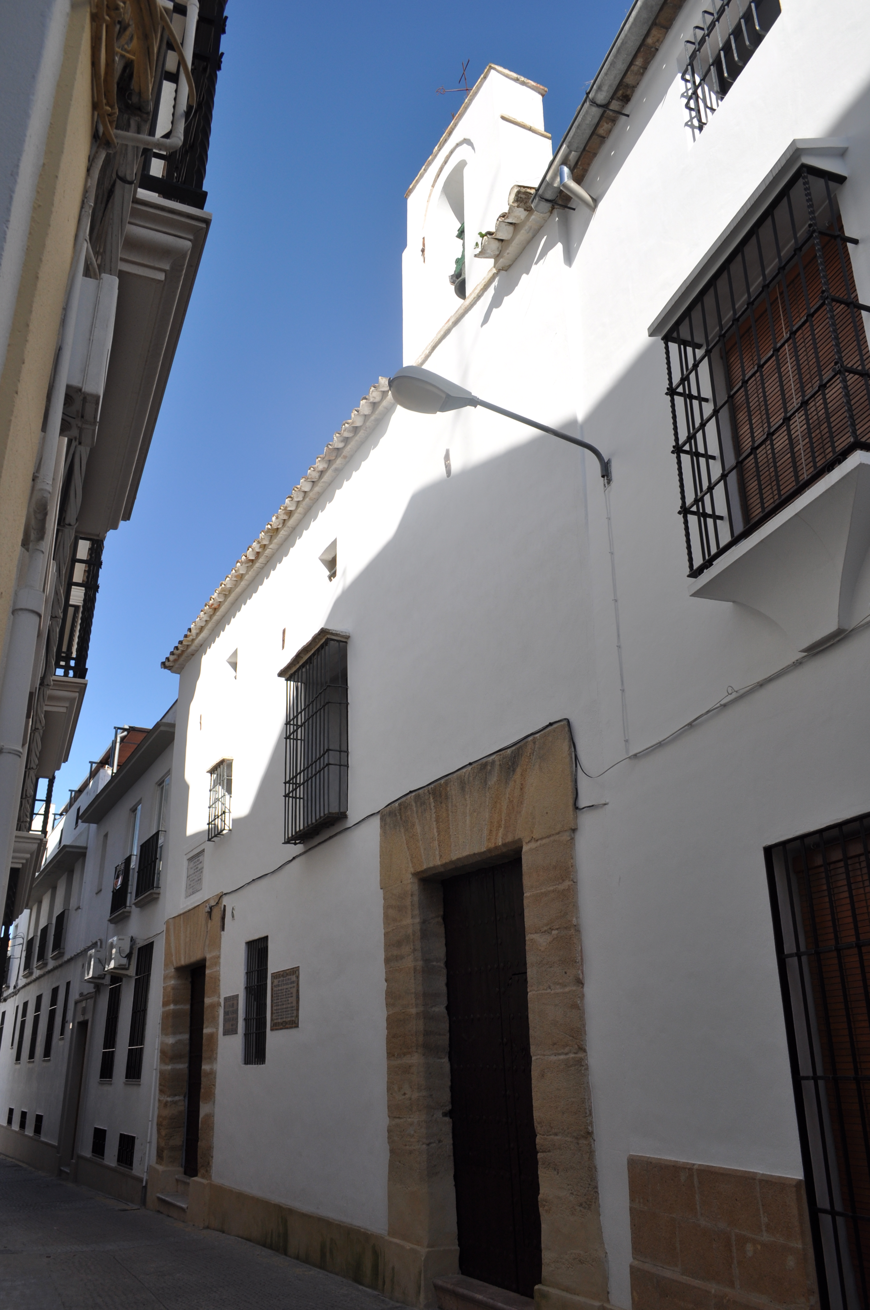 Casa-oratorio de San Juan de Ávila, donde vivió el santo montillano durante casi toda su vida.